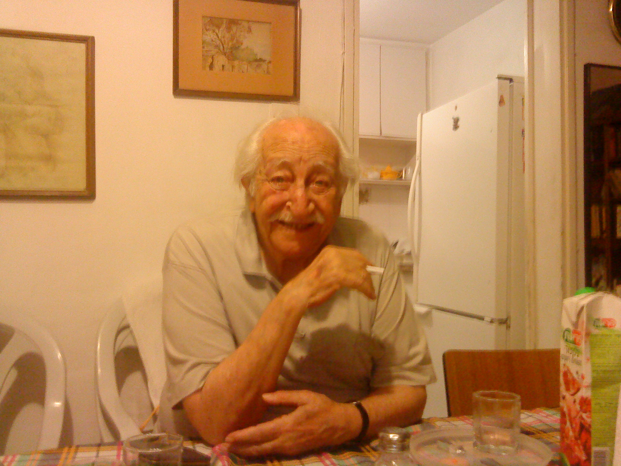 בביתו, ספטמבר 2009.